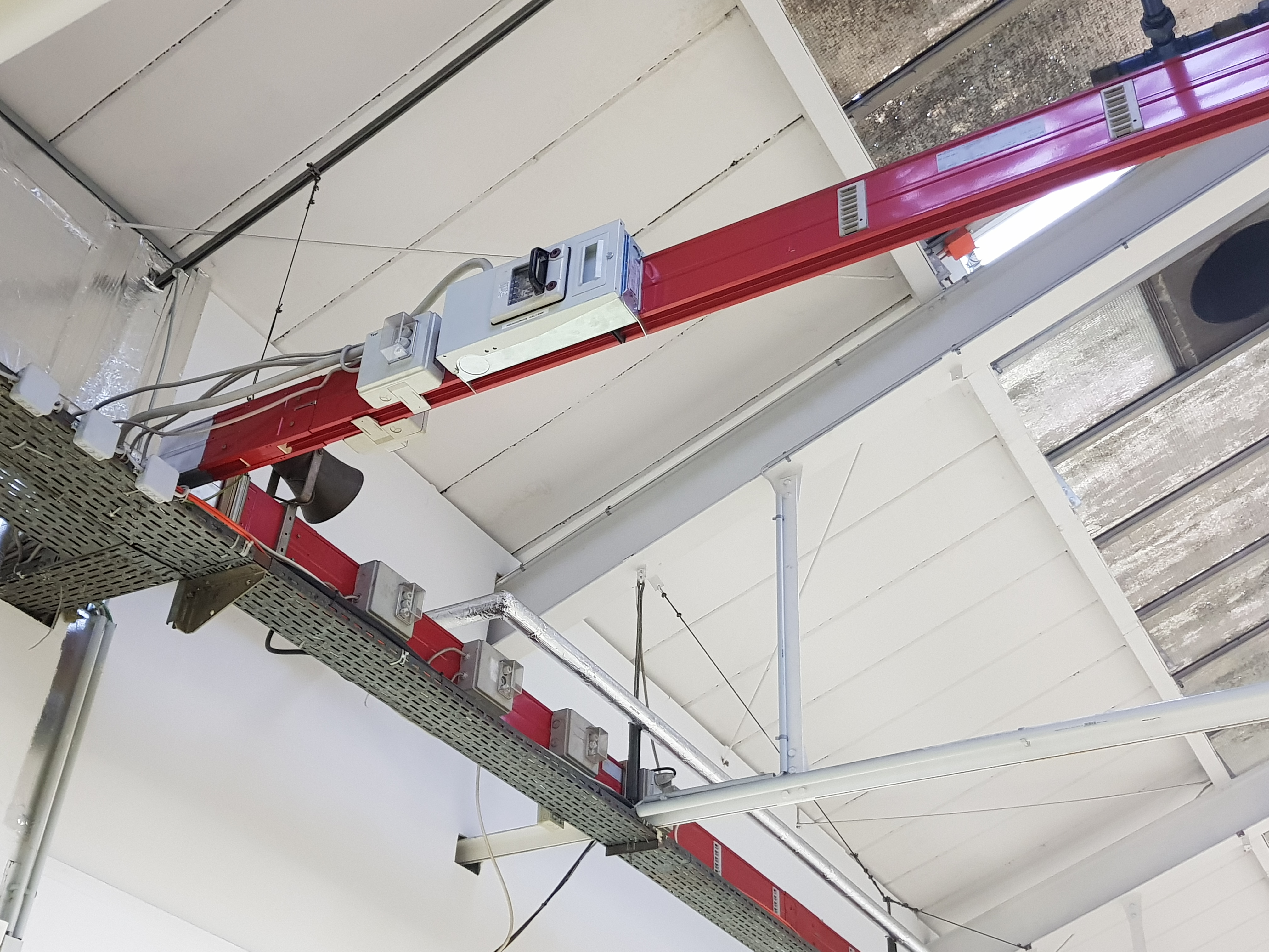 Energieabgriff an einer Stromschiene mittlerer Stromstärke